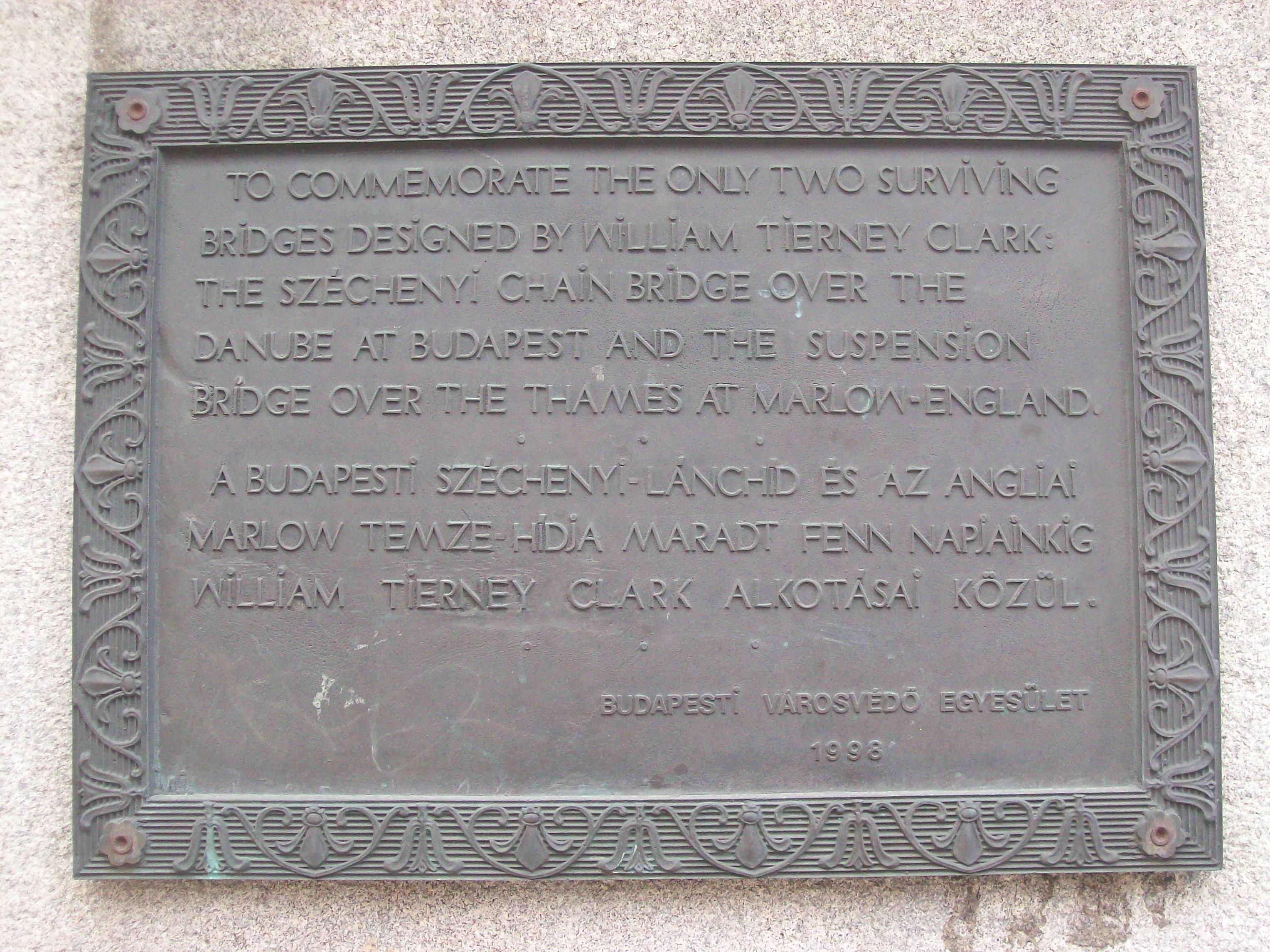 Kétnyelvű emléktábla a Lánchíd pesti hídfőjénél.